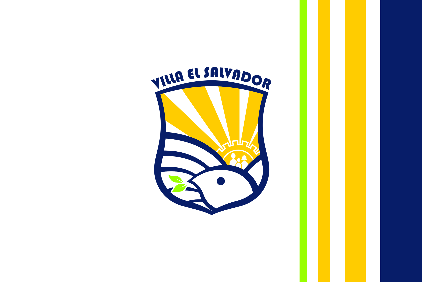 Distrito de Villa el Salvador - Provincia de Lima - Región Lima